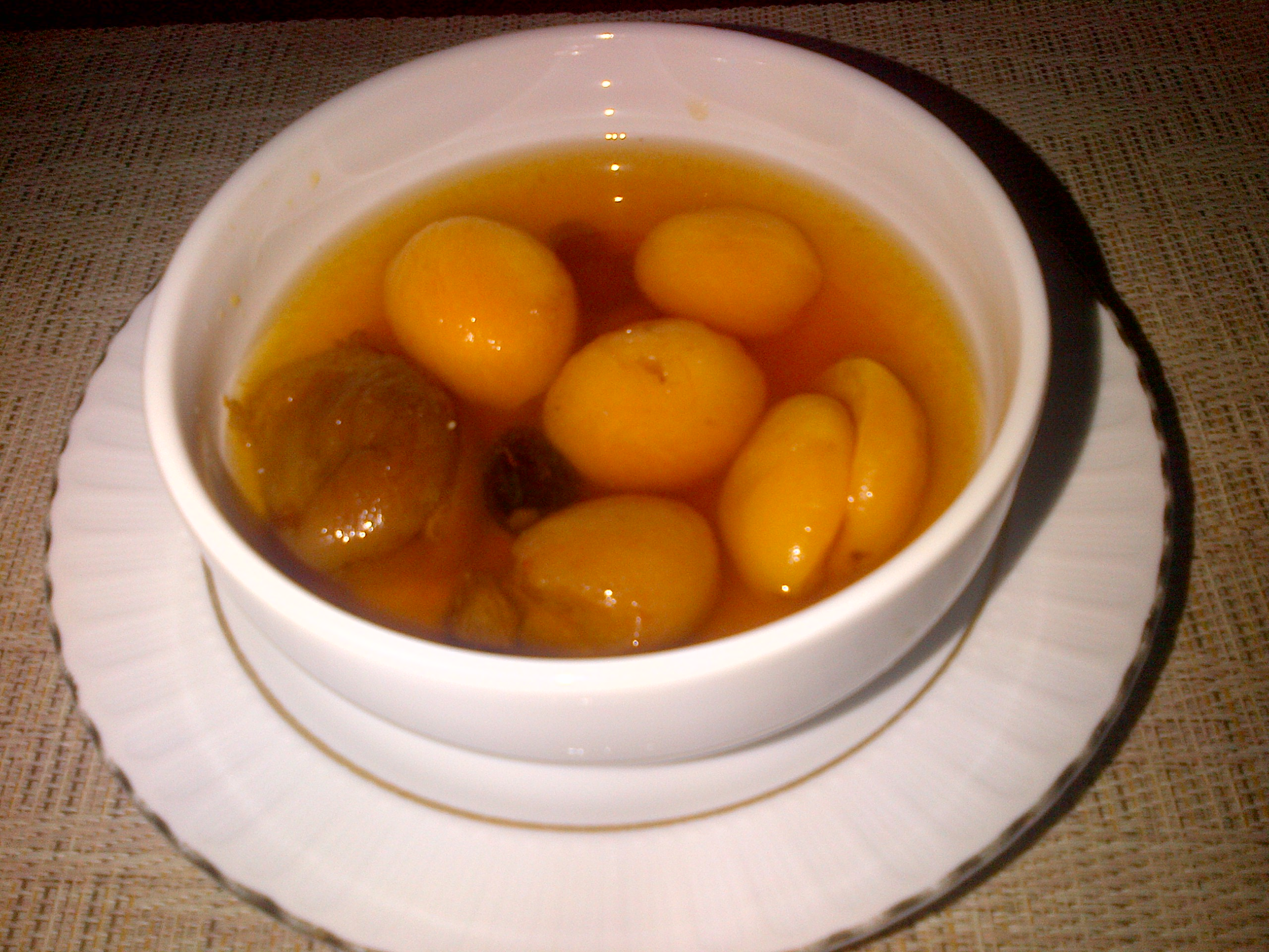 "Hoşaf" de albercocs secs, panses de prunes, i raïm.